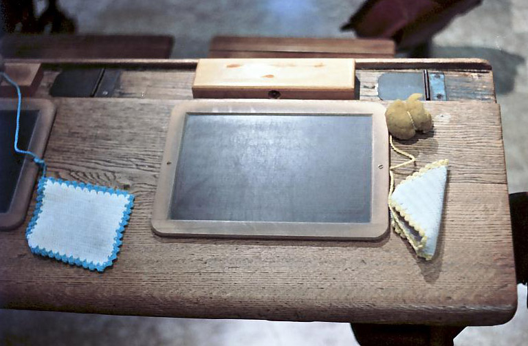 Alte Schulbank mit Schiefertafel, Griffelkasten und Wischtüchern. Solche Schulbänke wurden in Deutschland noch bis in die 1960er Jahre verwendet. (Aufgenommen im Schiefermuseum in Steinach)